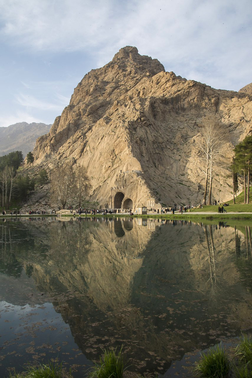 محل تفريحي و تاريخي طاق بستان